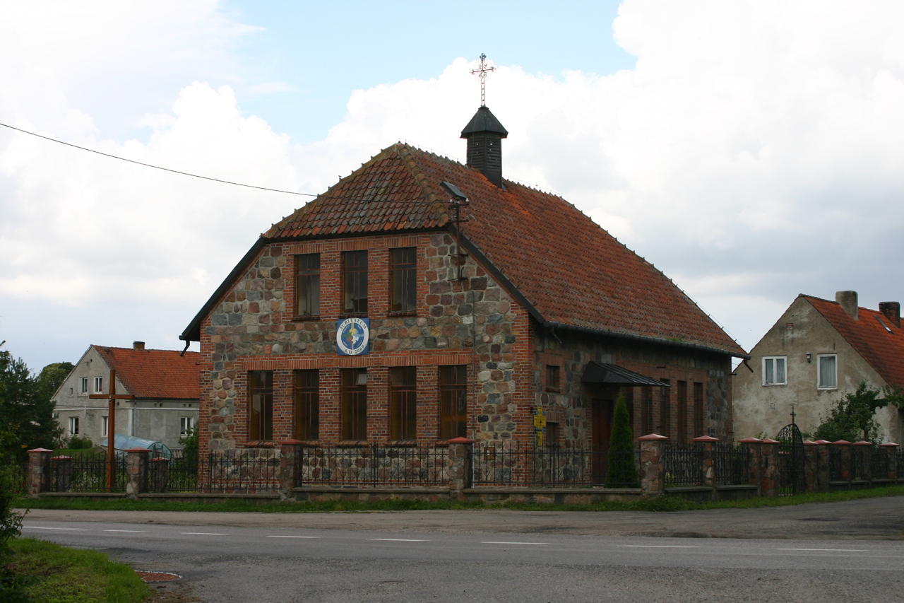 Nowa Różanka, Polska, powiat kętrzyński.